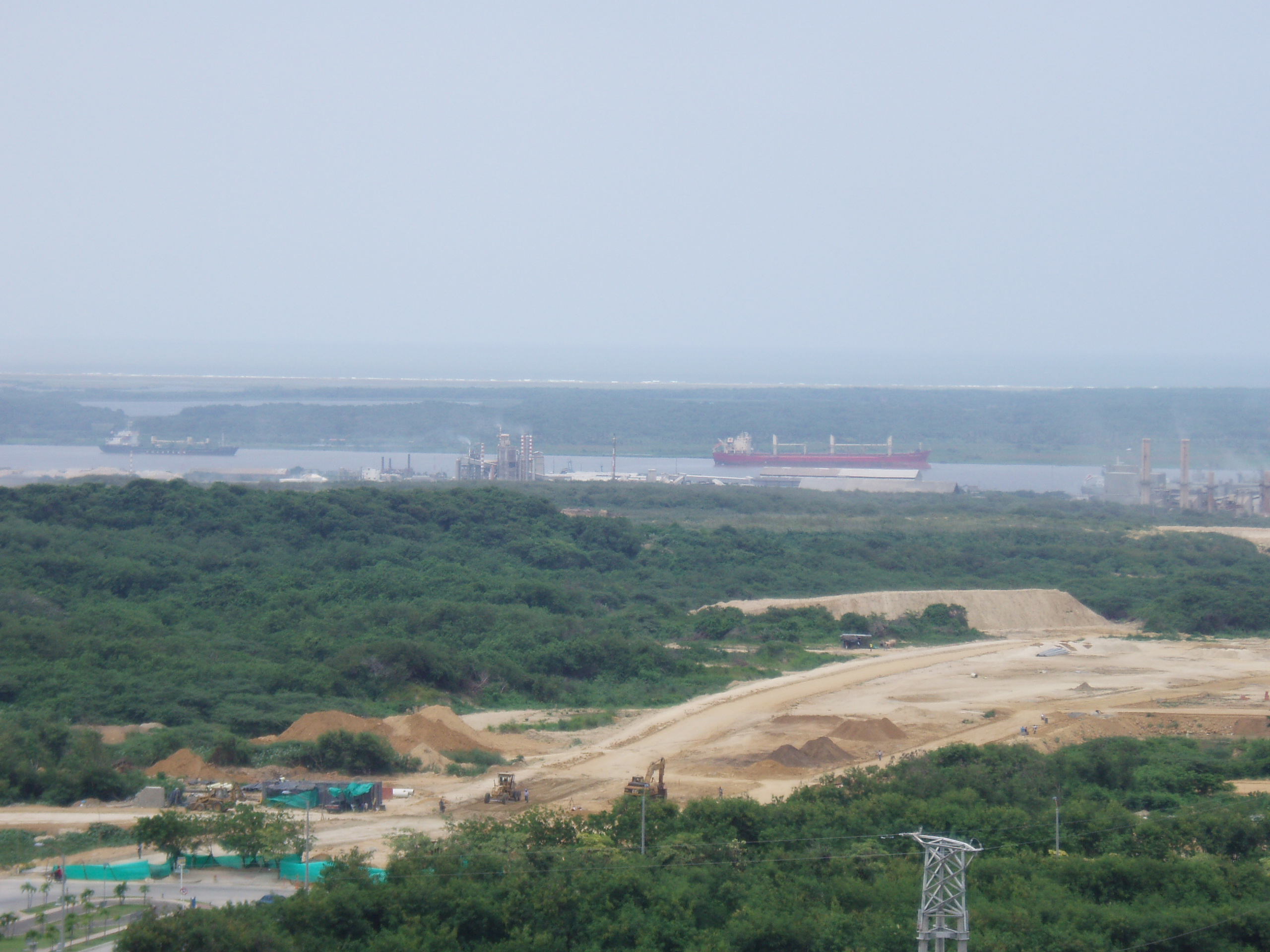 Puerto sobre el río Magdalena